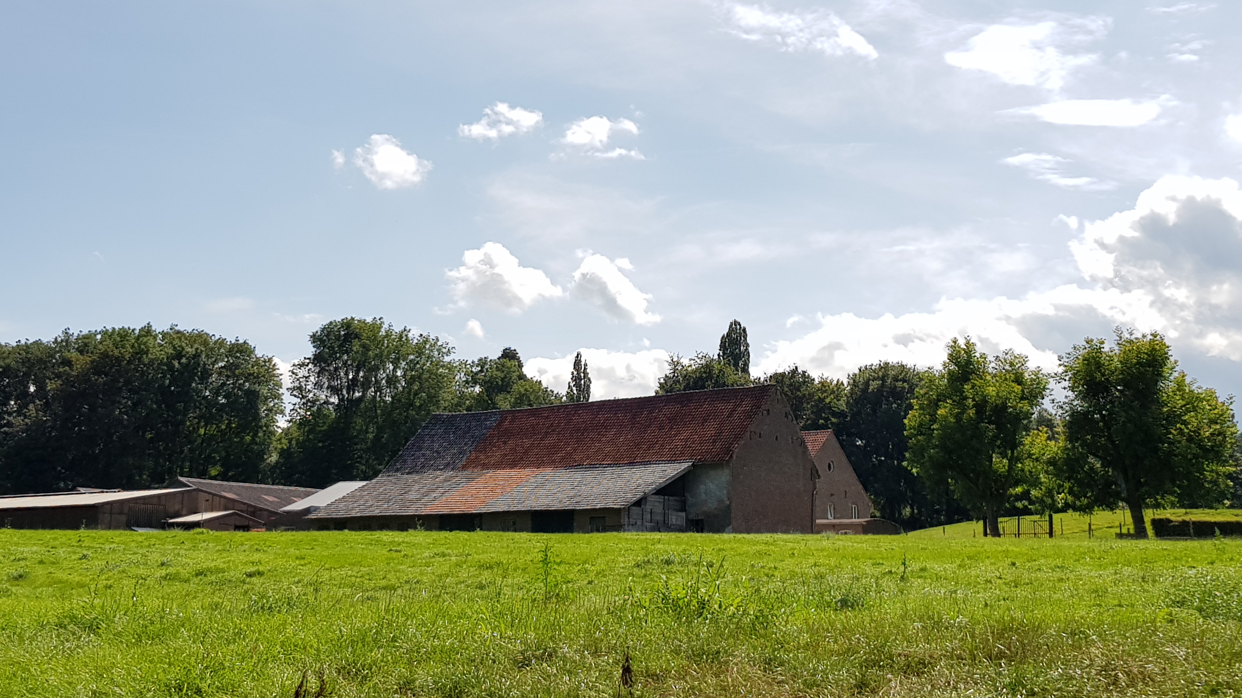 Beusdaelshof, Sint Antoniusbank 10, Bemelen, Limburg, Nederland